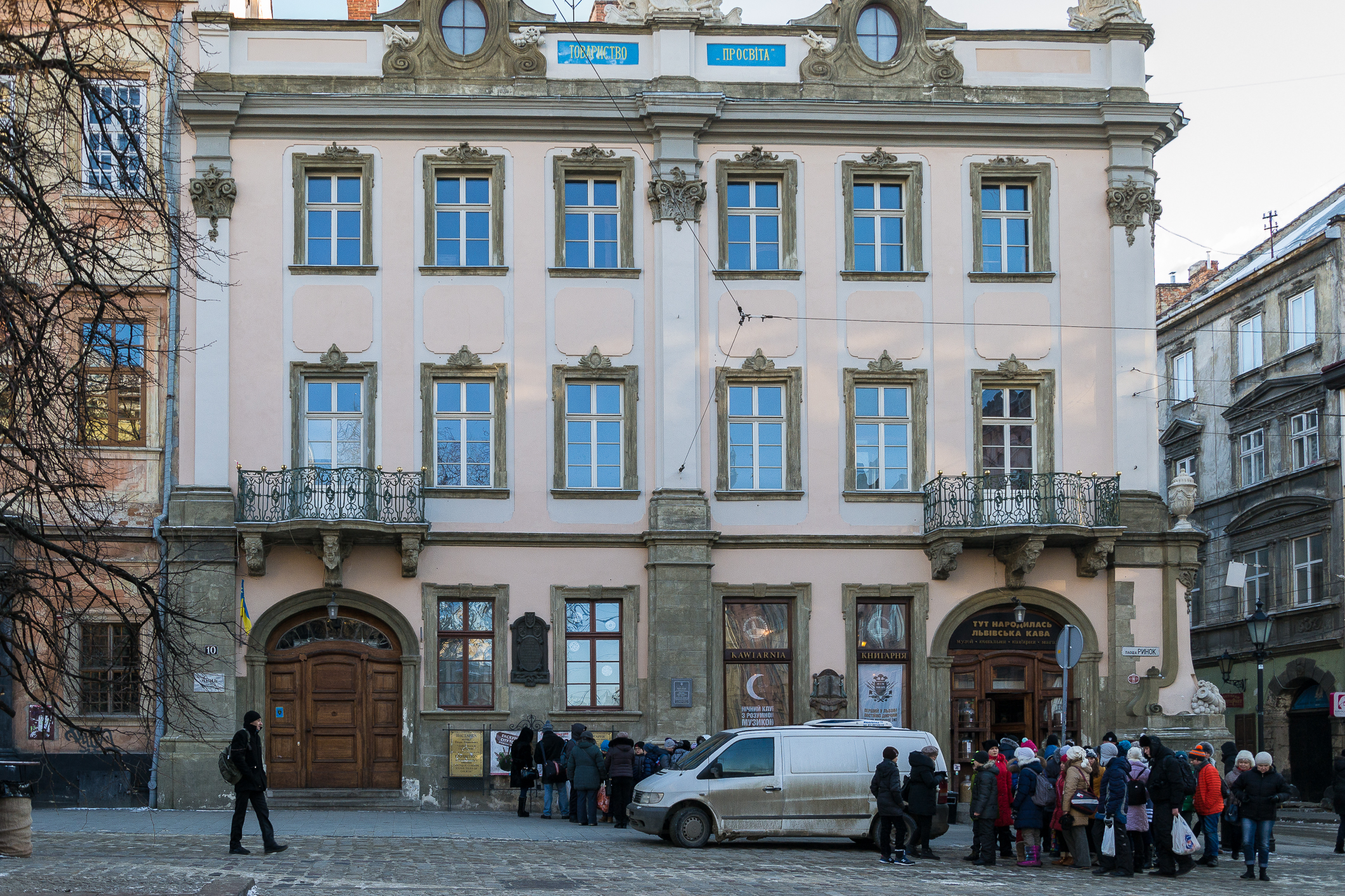 музей меблів — Будинок «Просвіти», в якому проголошено акт відновлення української держави, Львів, Ринок пл., 10